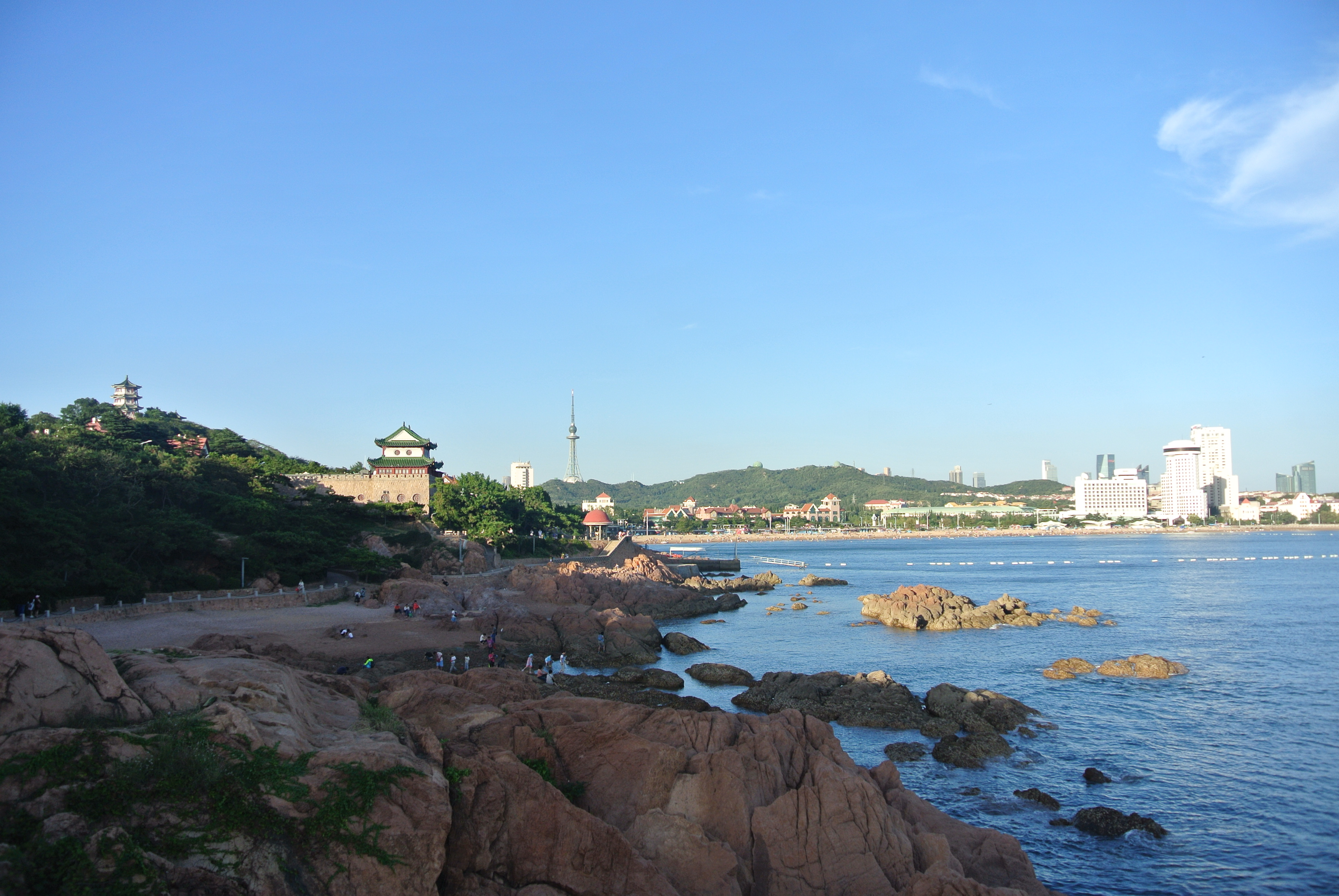 青岛鲁迅公园及水族馆